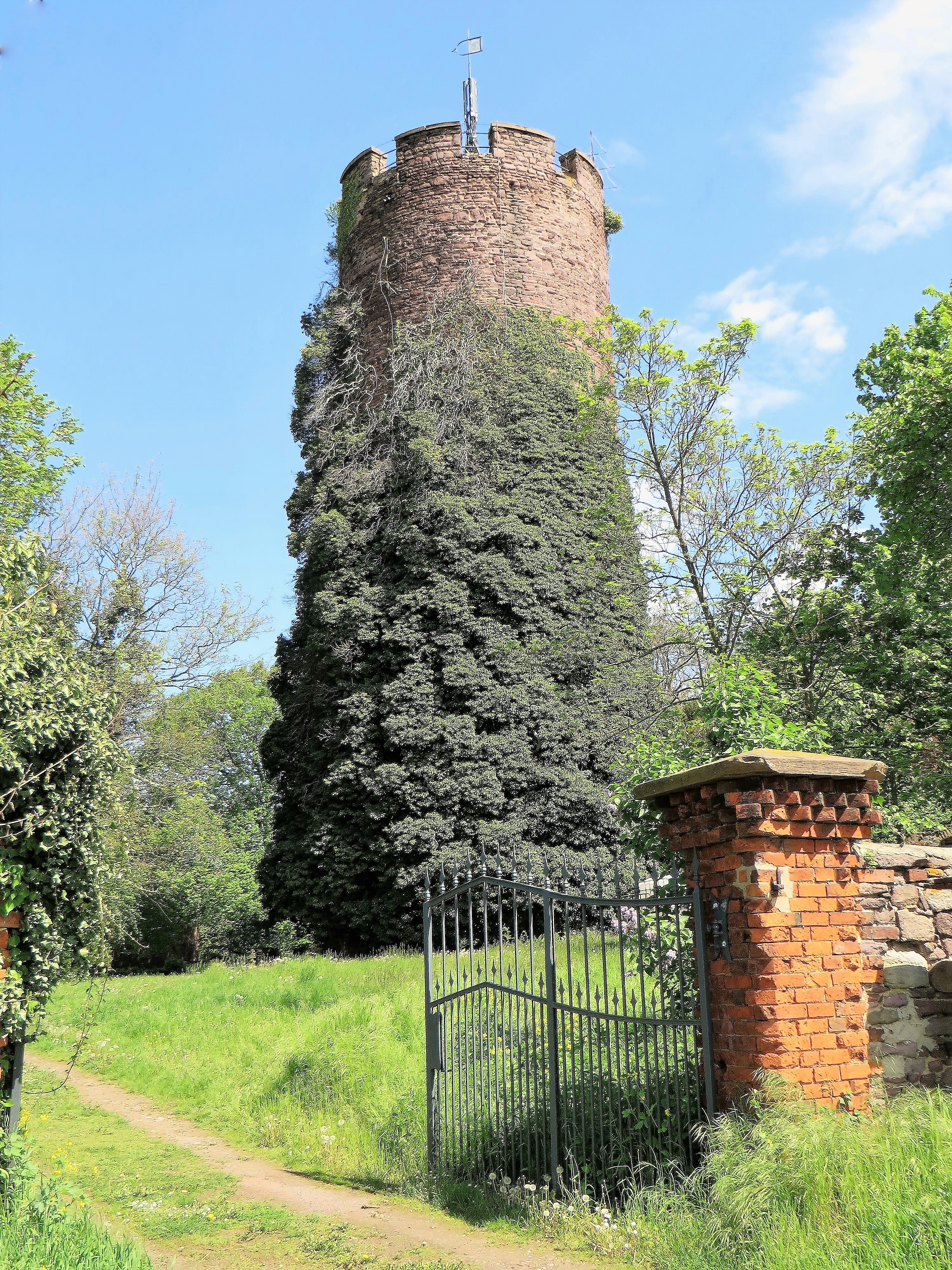 Bergfried der ehemaligen Bischofsburg in Alvensleben (Bebertal I), zeitweise Miteigentum oder Pfandbesitz der von Berwinkel. In der Nähe der Bischofsburg befand sich deren Schutzburg, die Ritterburg, um 1260 bis Ende des 15. Jahrhunderts in Besitz der Familie von Berwinkel. – Die Bischofsburg bestand über 600 Jahre bis die baufälligen Gebäude um 1700 allmählich abgetragen wurden. Geblieben ist nur der efeubekränzte 30 m hohe Bergfried, später im Volksmund „Landratsturm“ genannt, heute in Privatbesitz. – „Dort droben auf jenem Berge · Da schaut ihr die Warte der Burg: – Noch trotzet ihr festes Gemäuer · Dem nagenden Zahne der Zeit“.